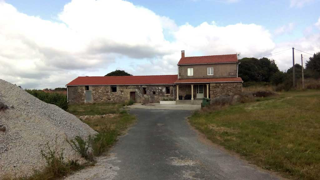 Vista de Vilarullo, Curtis.